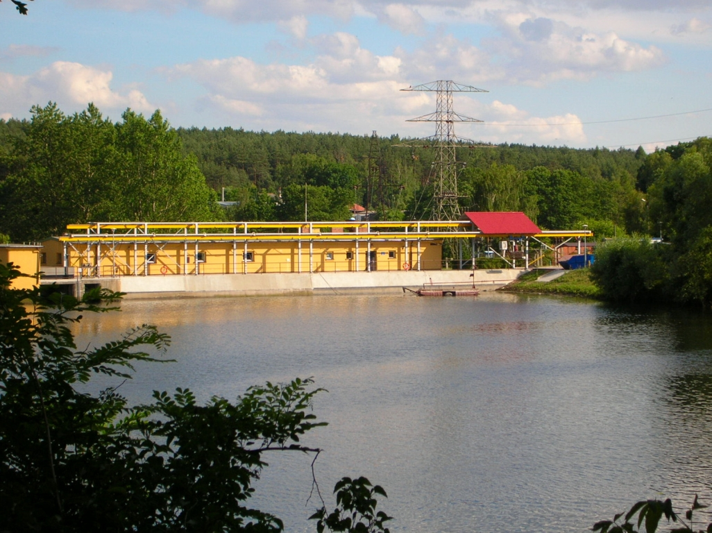 Zapora i elektrownia wodna na os. Smukała w Bydgoszczy